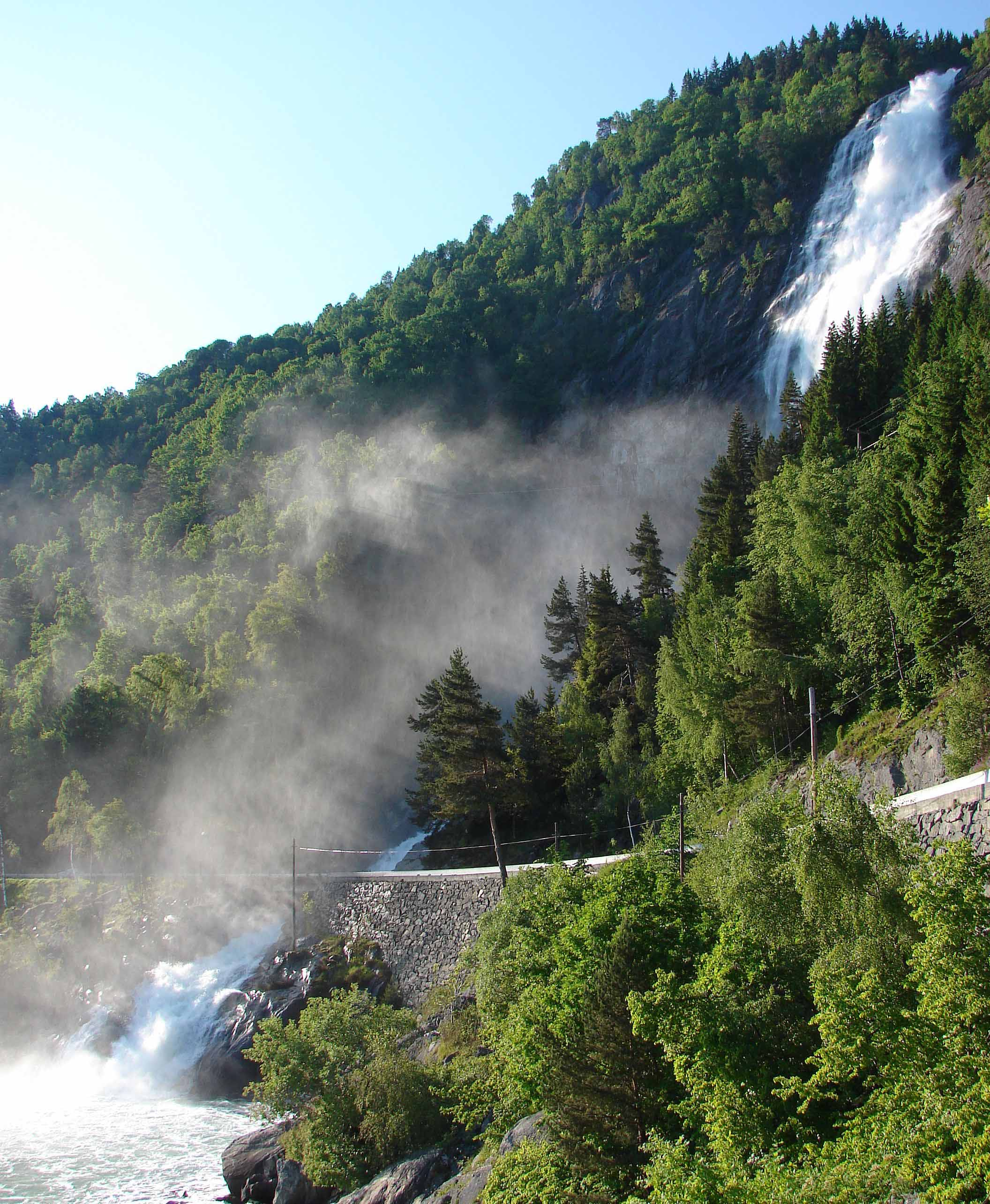 Kvinnefossen is a 120m high waterfall on road Rv55 in Leikanger municipality 2km east of Hella. Norwegian: Kvinnefossen er ein 120 m høg foss som renn ut i Sognefjorden. Den ligg på Rv55 i Leikanger kommune ca 2km øst for ferjeplassen Hella.